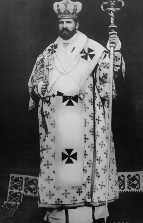 Миторополит Андрей Шептицький, глава УГКЦ: Миторополит Андрей Шептицький, глава УГКЦ